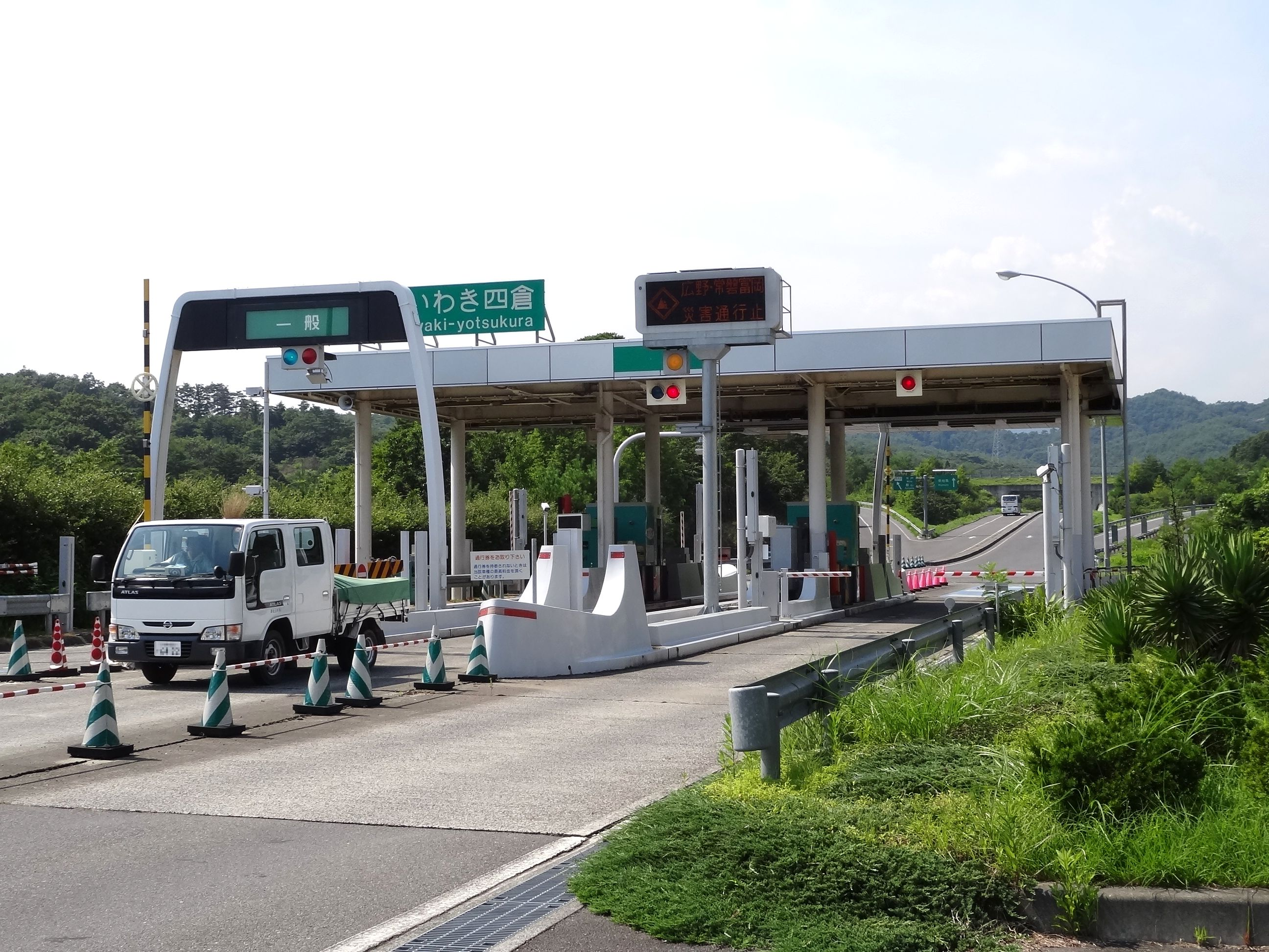 常磐自動車道 いわき四倉インターチェンジ（料金所付近）